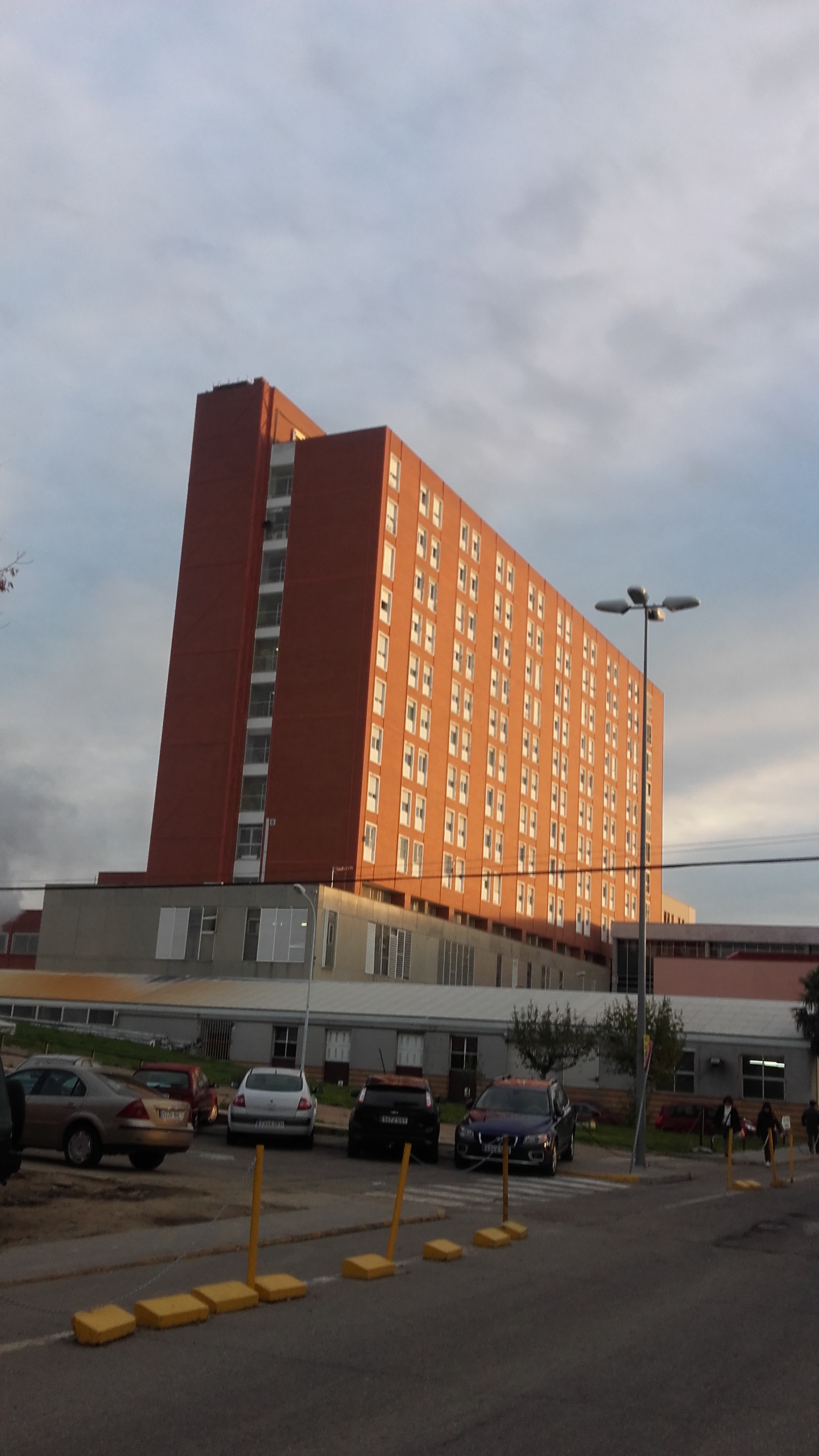 Hospital Río Carrión de Palencia (España)